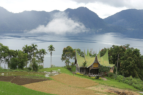 Lake Maninjau, West Sumatra